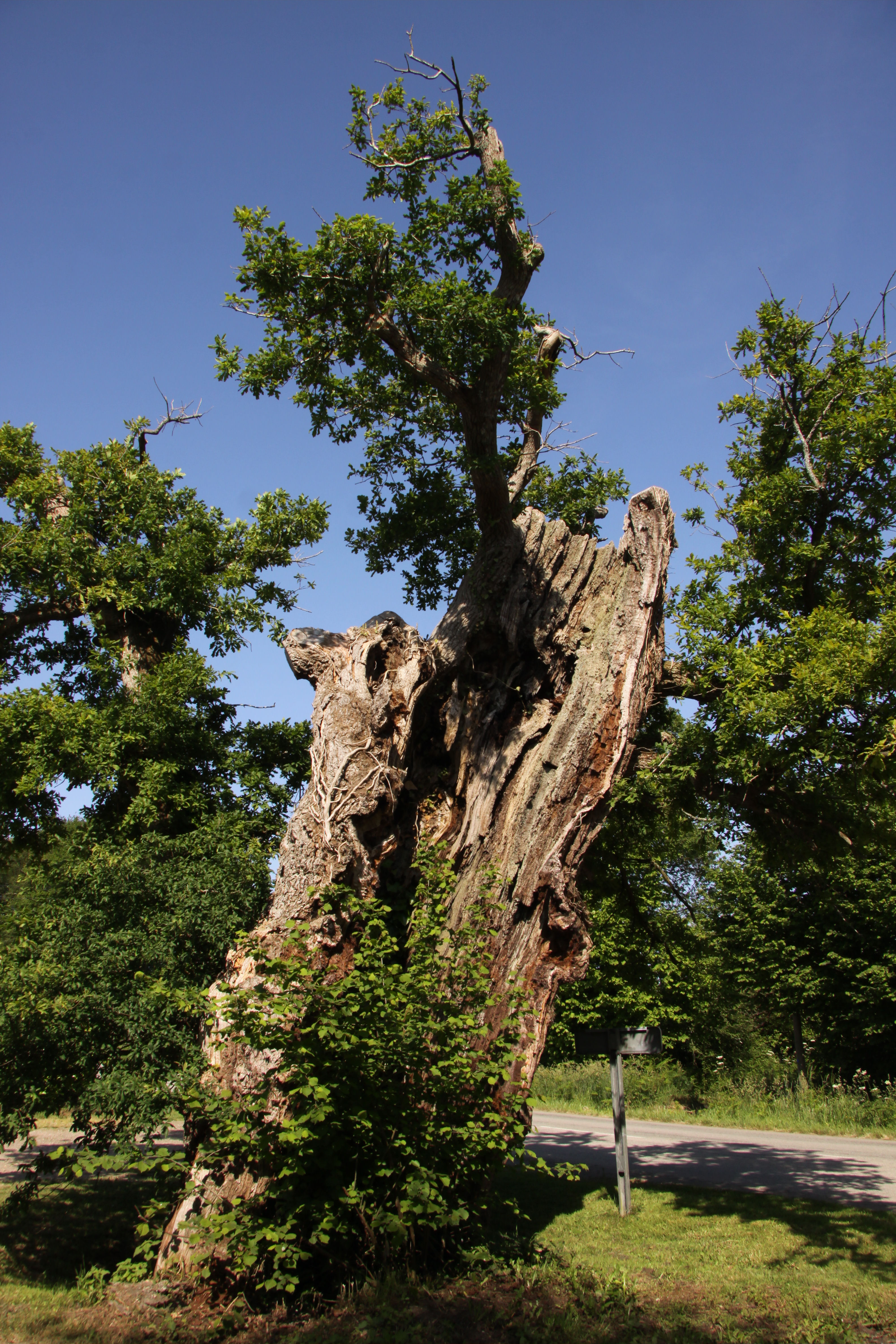 Saint-Jean-Brévelay (Morbihan, Bretagne, France) : Le chêne du Pouldu à la fin du printemps.